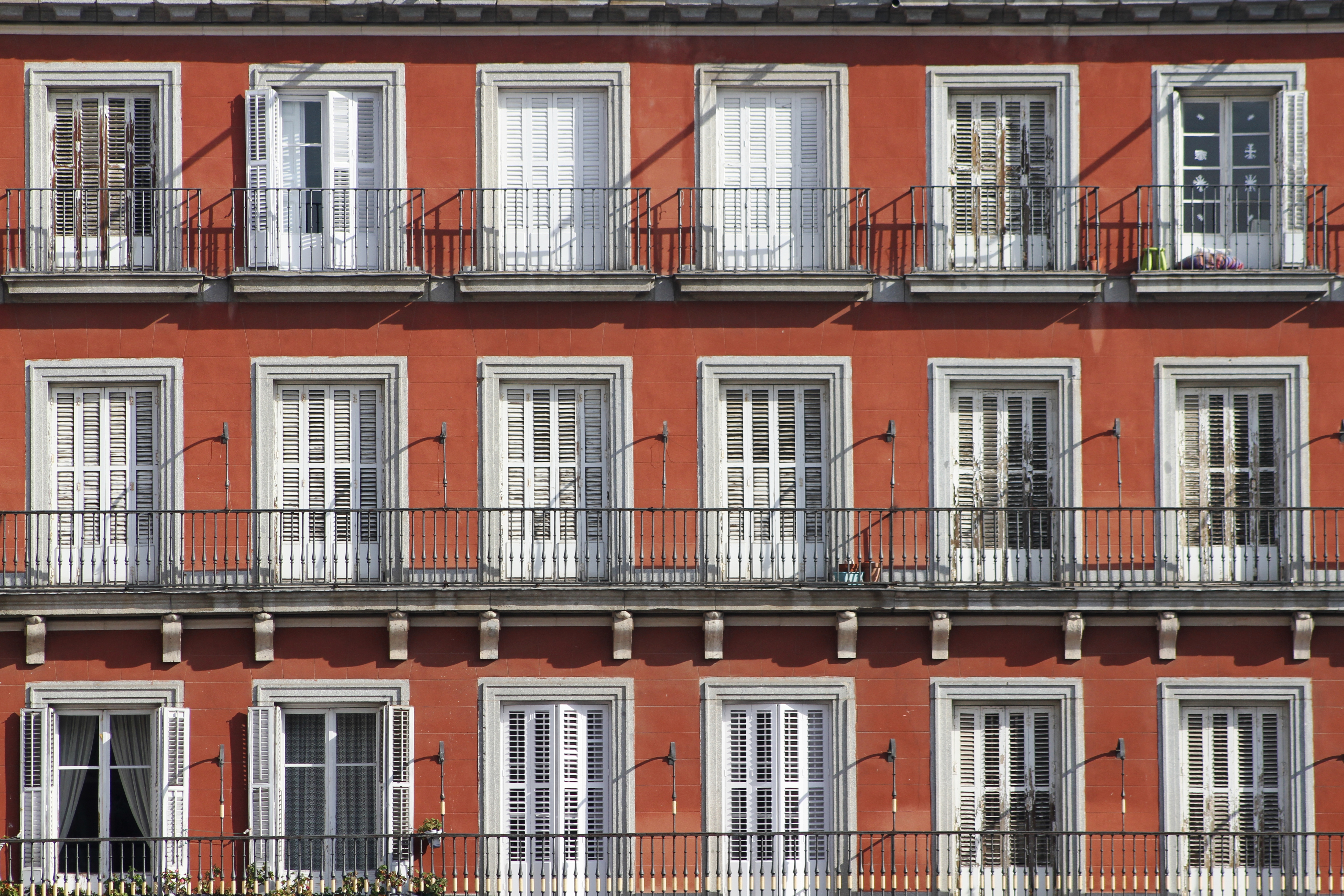 Janelas